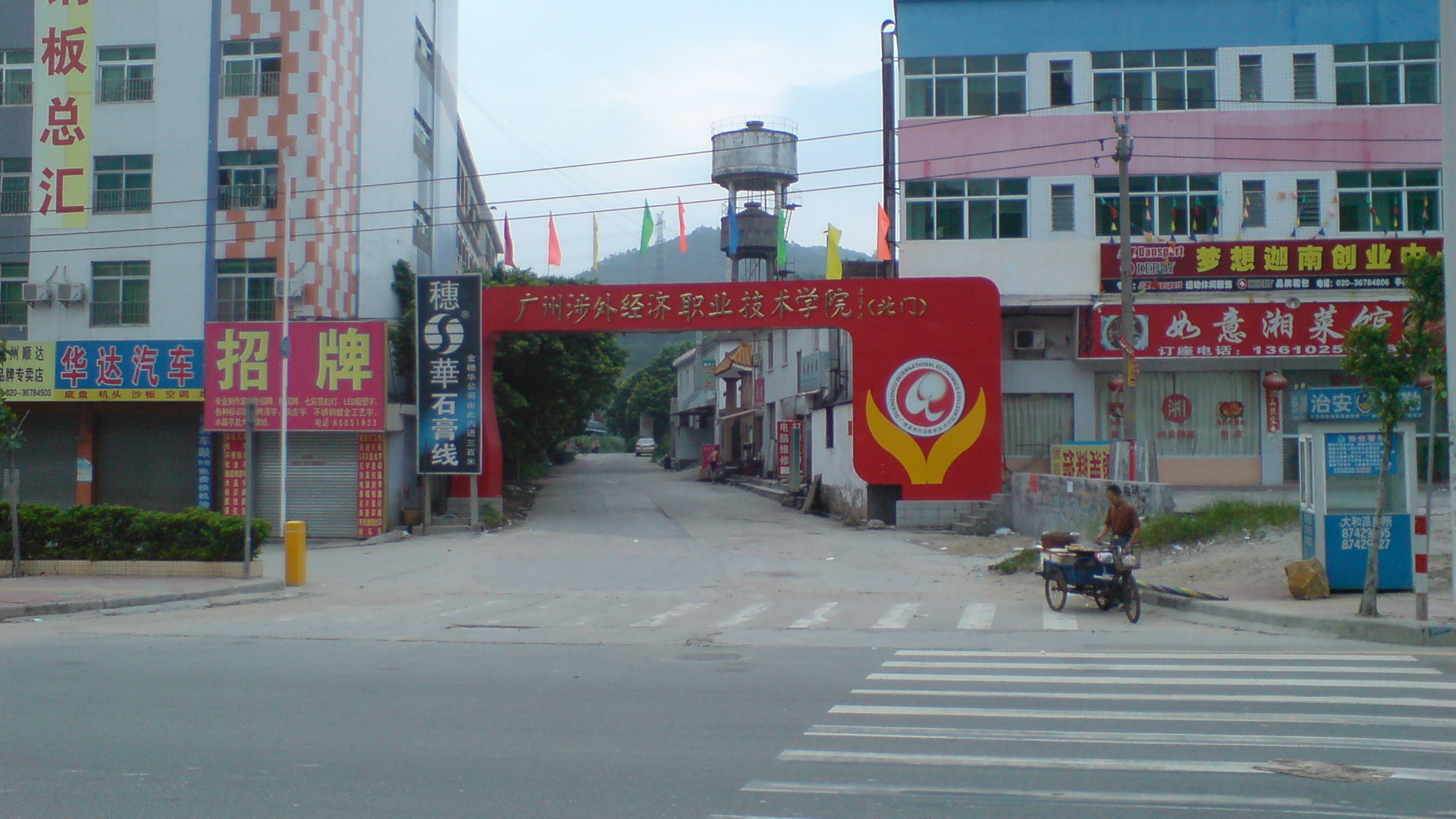 中文（中国大陆）: 广州涉外经济职业技术学院北门。